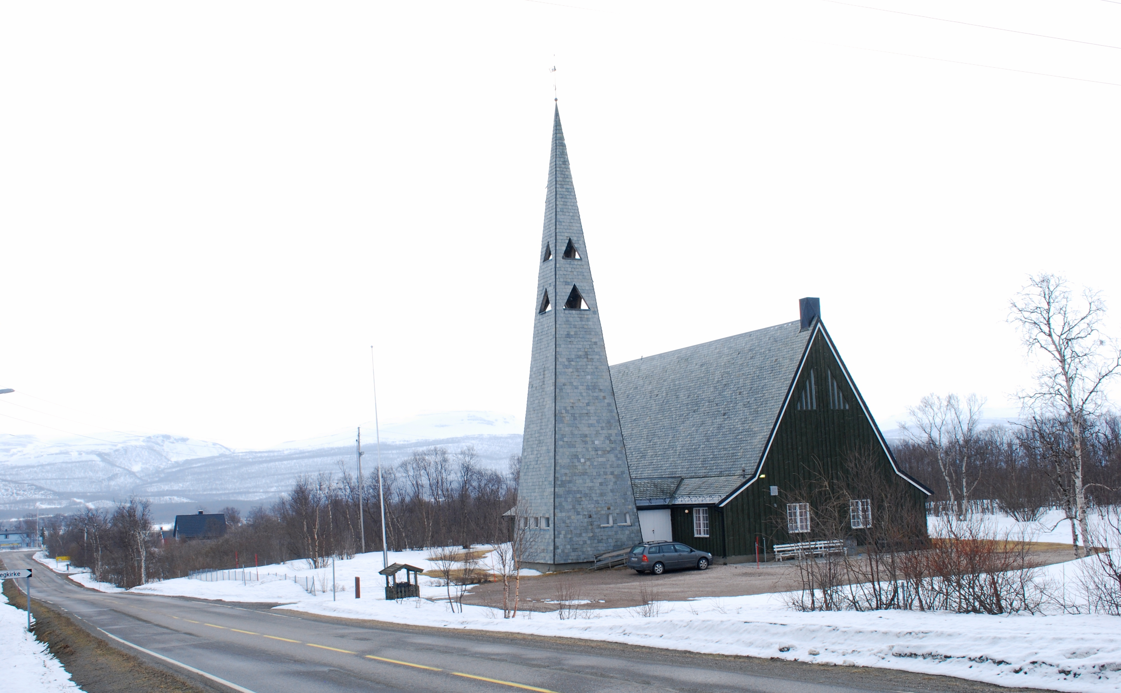 Tana kirke at Rustefjelbma